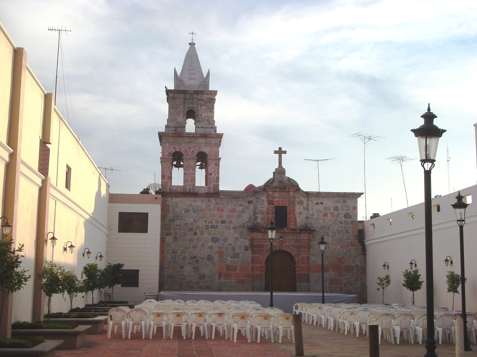 Templo la Conchita de San Martin Hidalgo